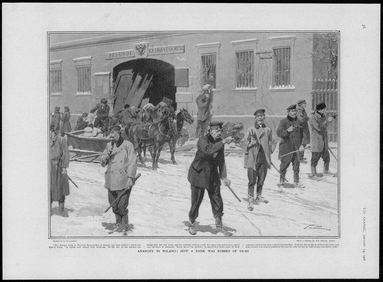 W nocy z 26 na 27 grudnia 1905 roku Organizacja Techniczno-Bojowa Polskiej Partii Socjalistycznej, pod dowództwem Ludwika Śledzińskiego, dokonała napadu na kasę powiatową. Zdobyto około 480 tys. rubli, które przeznaczono na działalność rewolucyjną PPS, zakup amunicji i broni. Pierwotnie pieniądze zostały przesłane przez władze zaborcze z Petersburga z przeznaczeniem na budowę fortu wojskowego w Zambrowie. Zabito lub raniono podczas odwrotu kilku strażników.